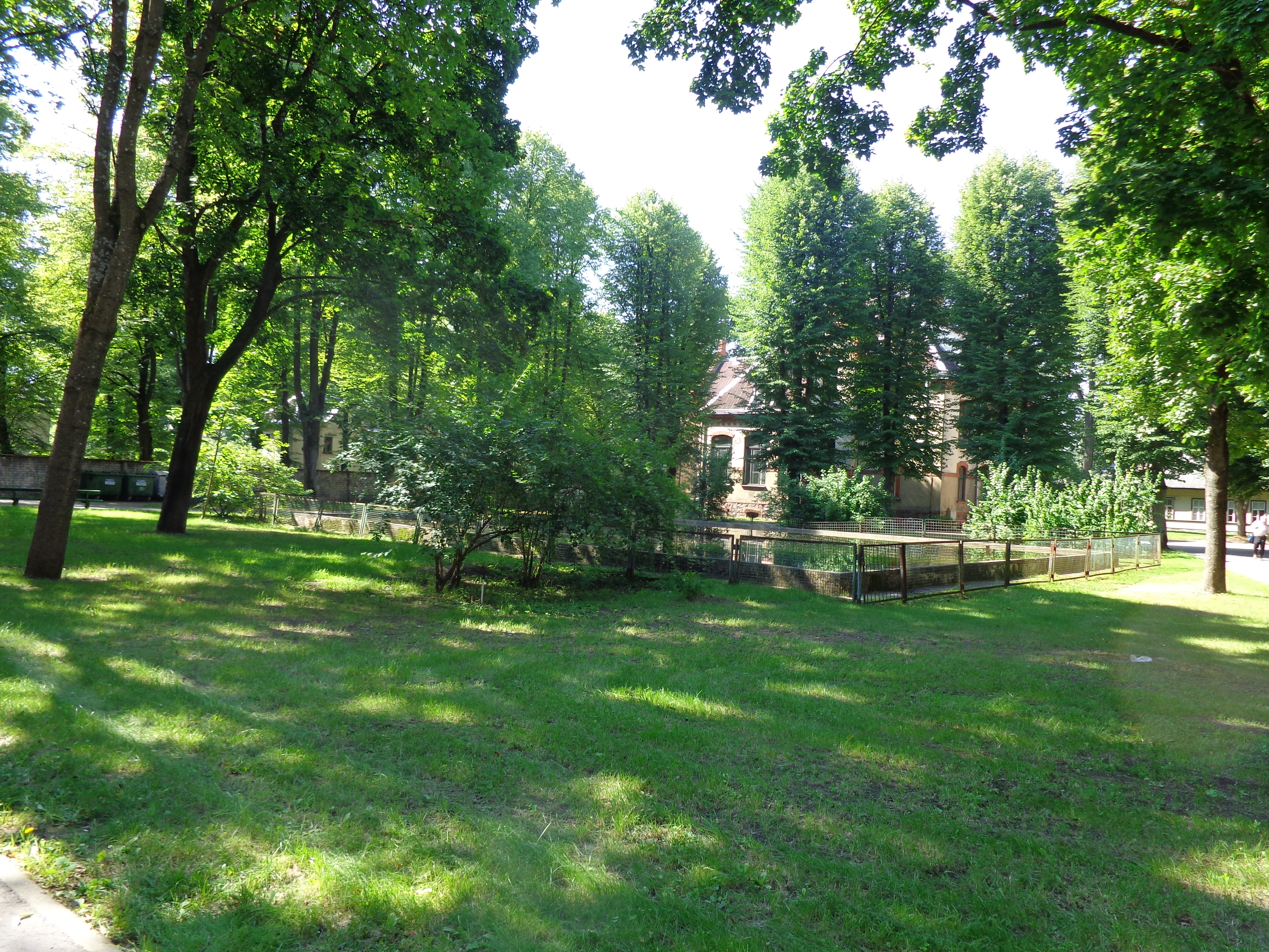 Rīga, Pilsoņu iela(street) 13